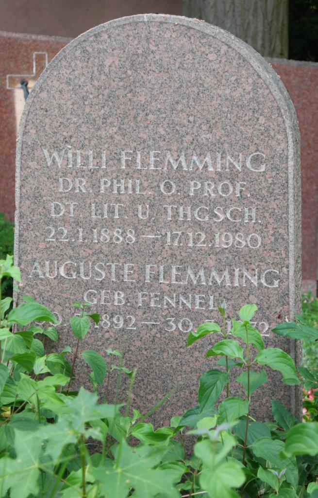 Grab des Theaterwissenschaftlers und Germanisten Willi Flemming, 1888-1980, auf dem Hauptfriedhof Mainz